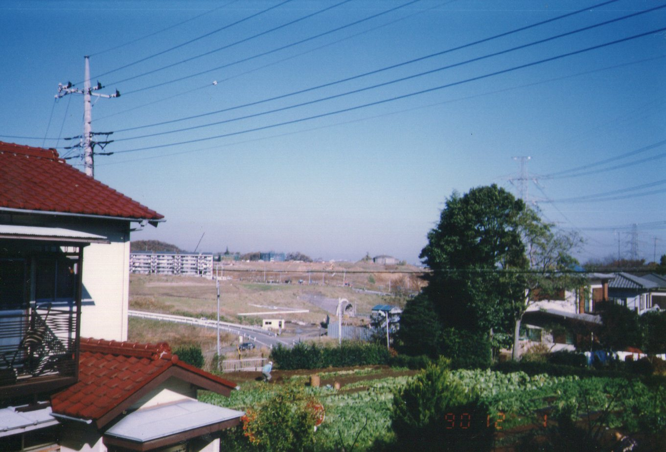 90・12・01・百村くるみ荘から見た向陽台と完成前の尾根幹線道路